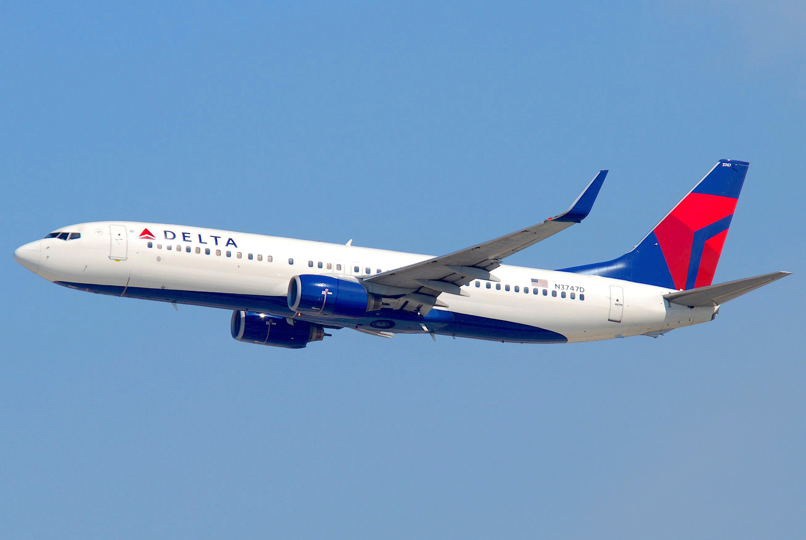 Delta Air Lines Boeing 737-800; N3747D@LAX;10.10.2011/622in